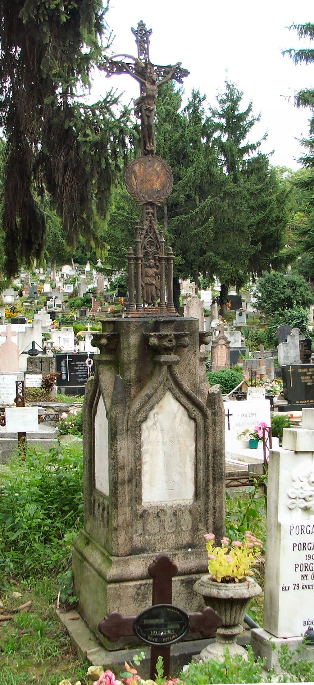 Beszédes Sándor sírja, belvárosi temető, Esztergom